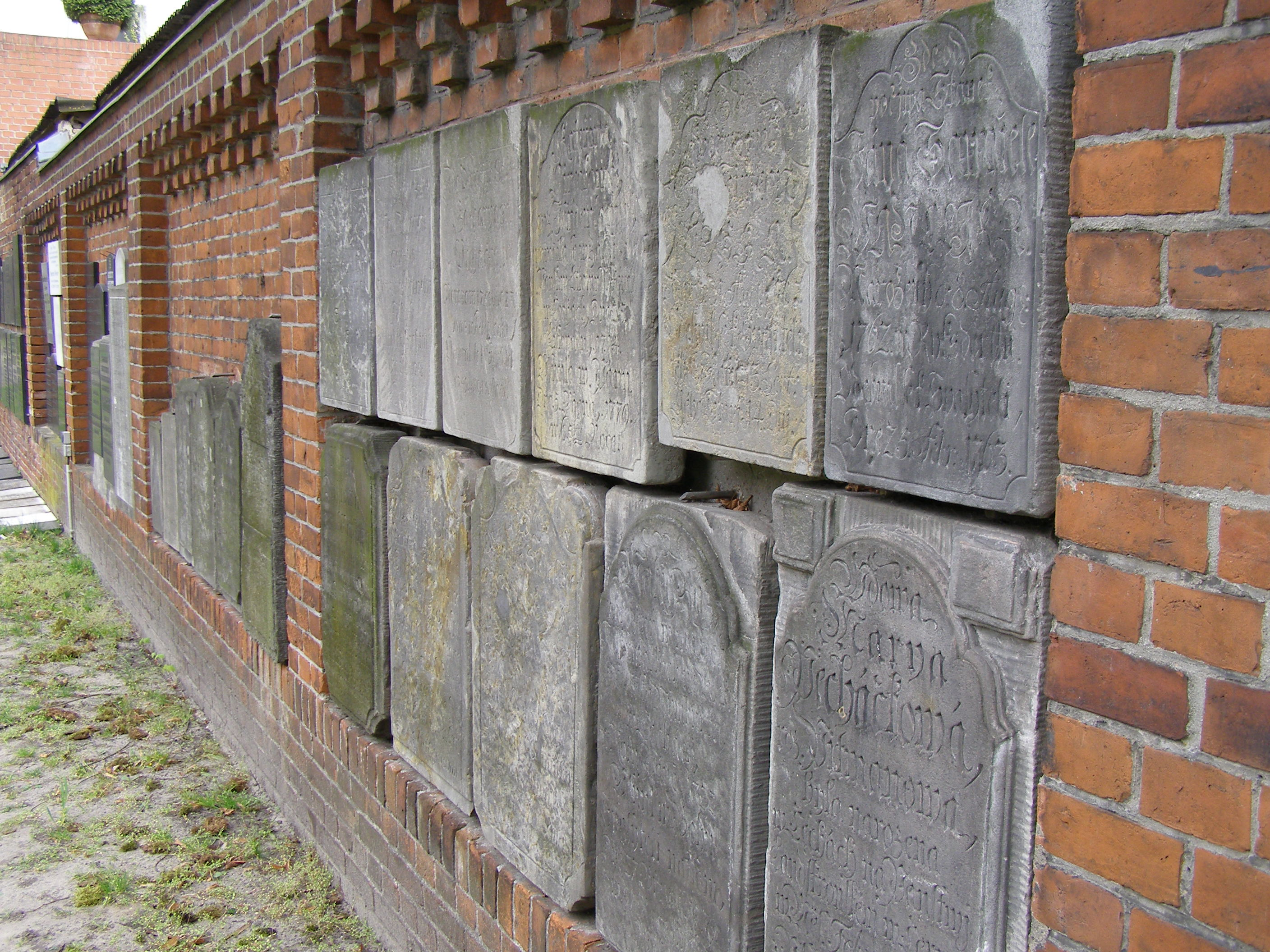 Berlin, Böhmisch-Rixdorf, Böhmisches Gottesacker, alte Grabsteine Berlin, Bohemian Rixdorf, Bohemian Cemetery, old gravesstones Berlín, Český Rixdorf, Český hřbitov, staré náhrobní kameny